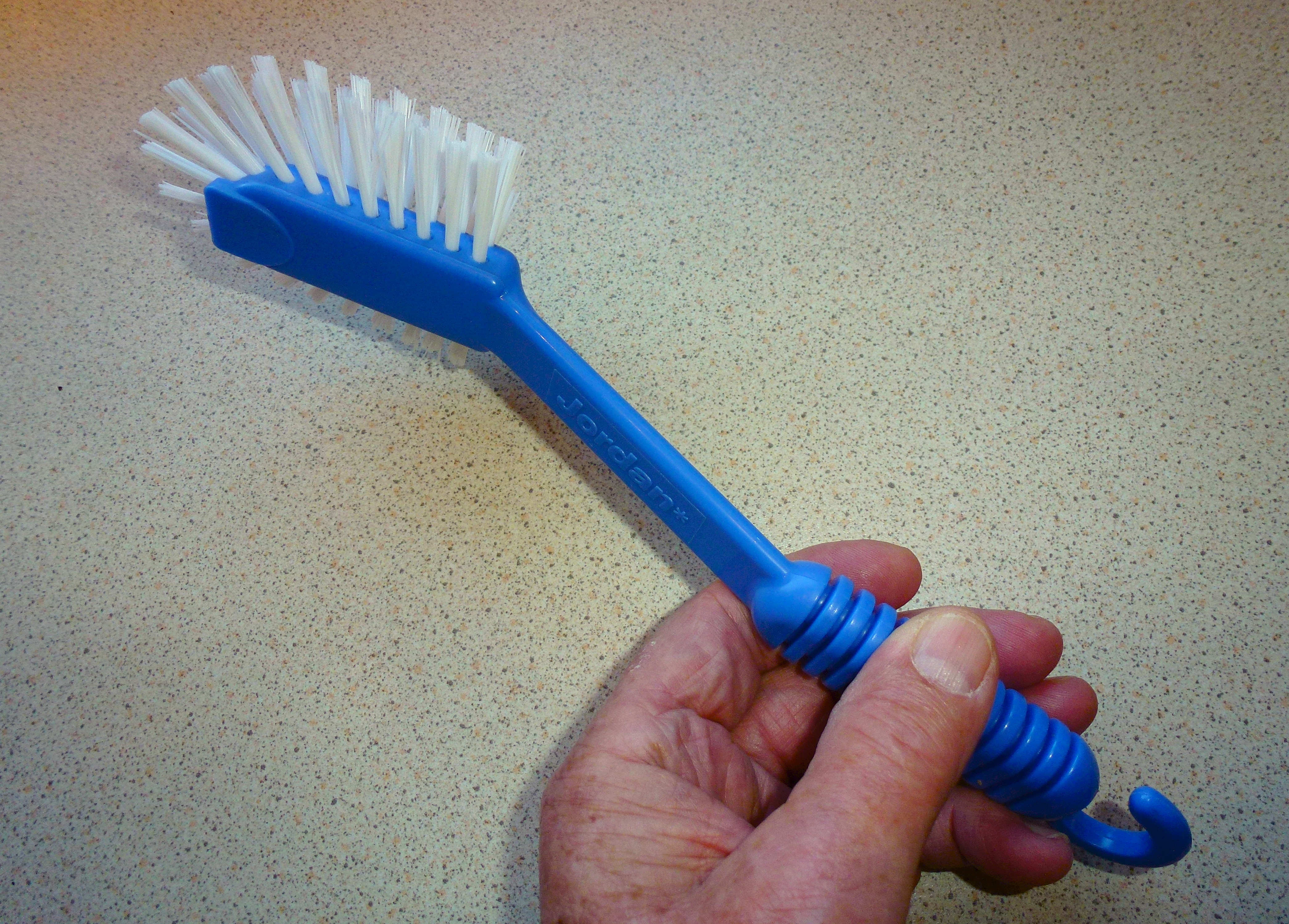 Diskborsten nr. 1230, som utvecklades 1974 av A&E Design.